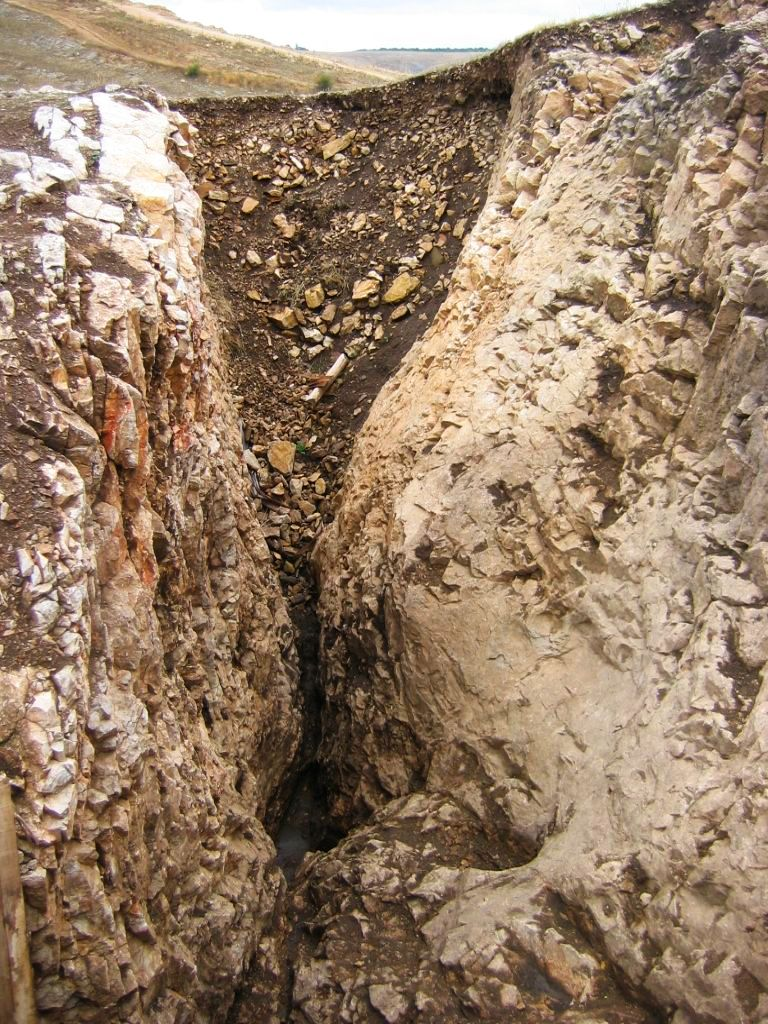 Castro Cántabro de La Loma. Santibáñez de la Peña (Palencia, Castilla y León). Vista desde el Norte del foso de 6 metros de profundidad excavado en la roca que protegía la parte Este del castro.